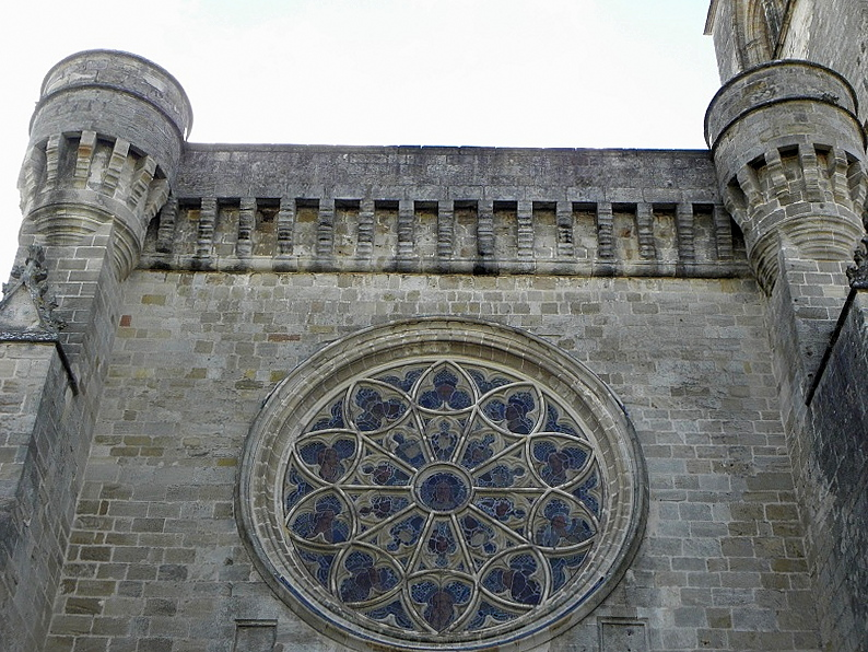 Extérieur de la cathédrale Saint-Fulcran de Lodève (34).